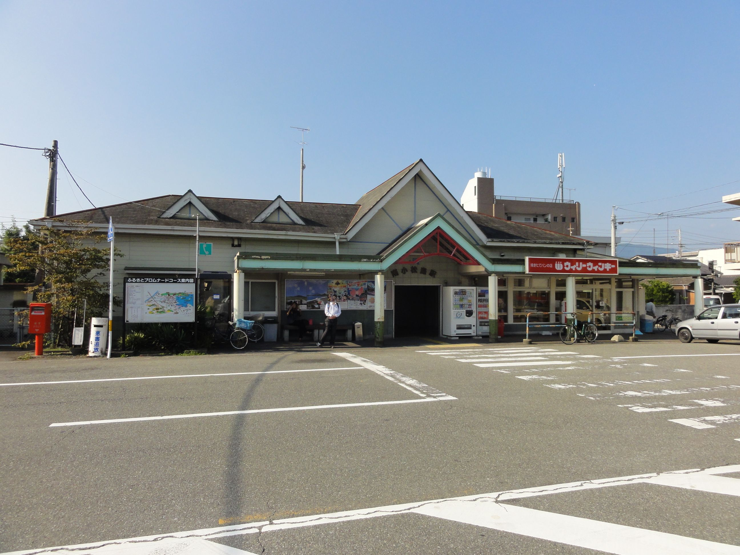 南小松島駅